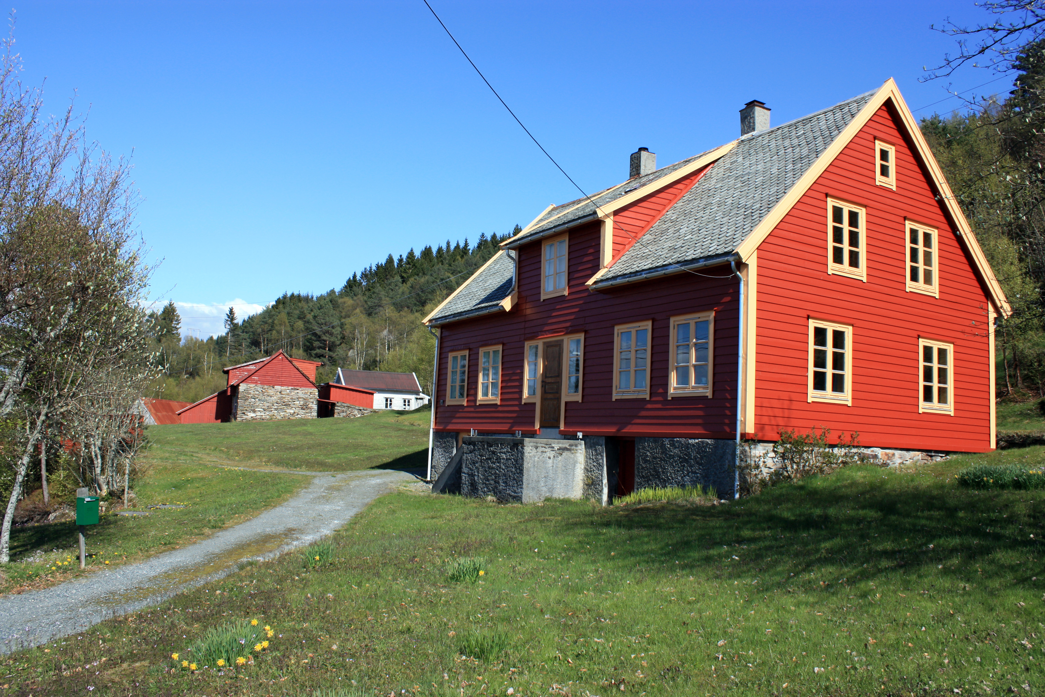 Rød, Fana, Bergen, at Fanafjorden